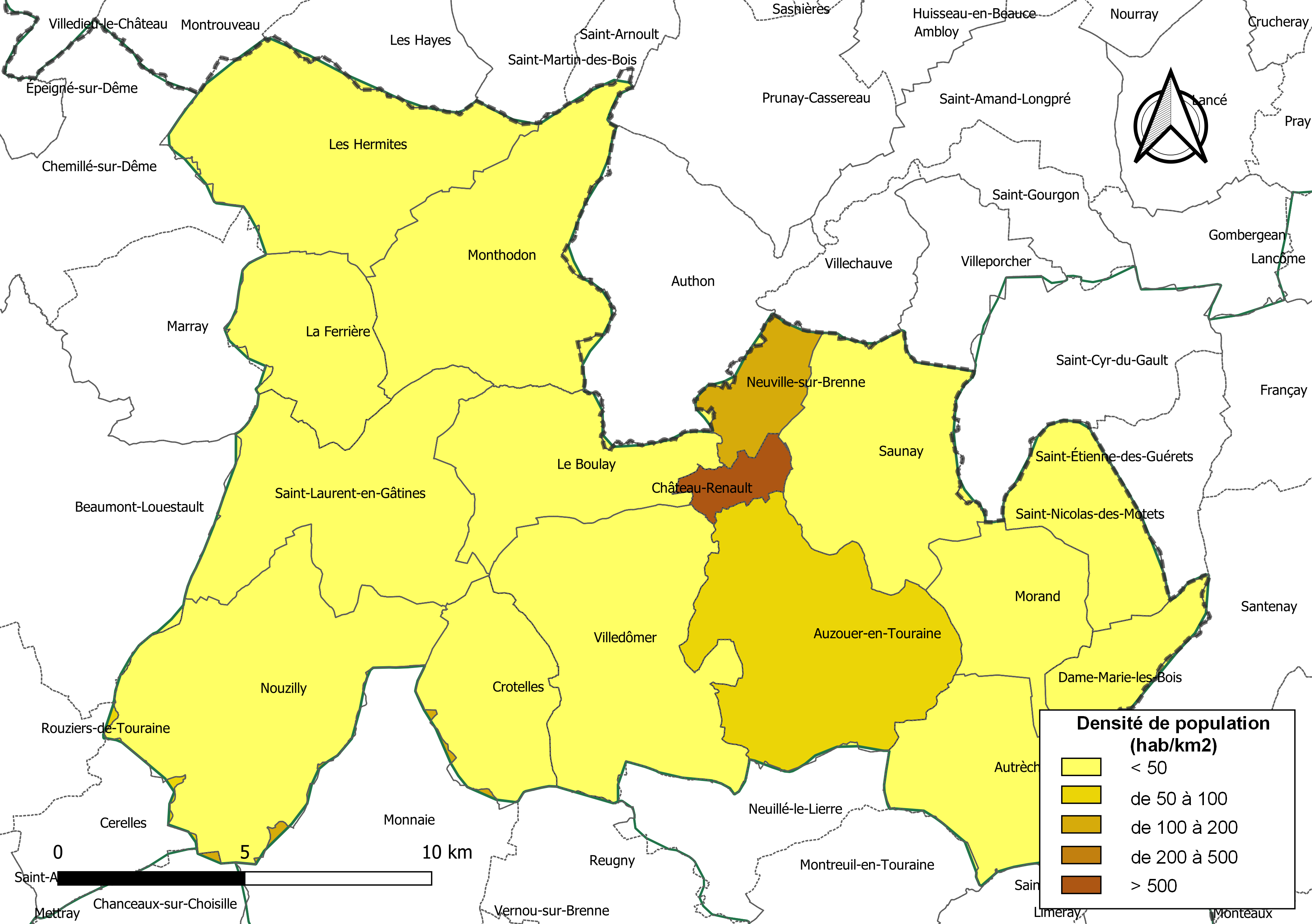 Carte des densités de population (millésimée 2016) des communes de la communauté de communes la Communauté de communes du Castelrenaudais, département d'Indre-et-Loire, France. Composition au 1er janvier 2019.